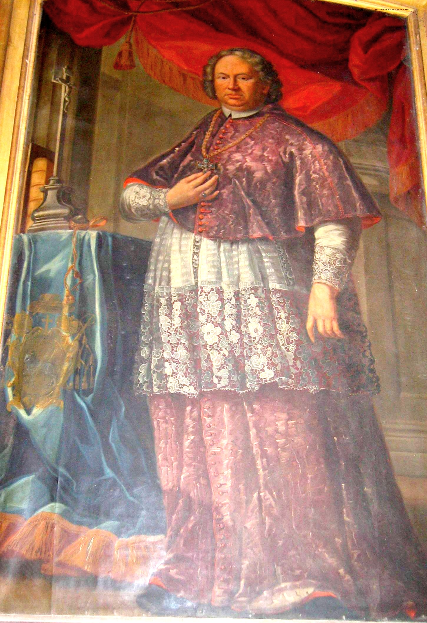 Felicjan Konstanty Szaniawski bishop of Kraków on anonymous XVIII century portrait image taken by user:Mathiasrex Maciej Szczepańczyk